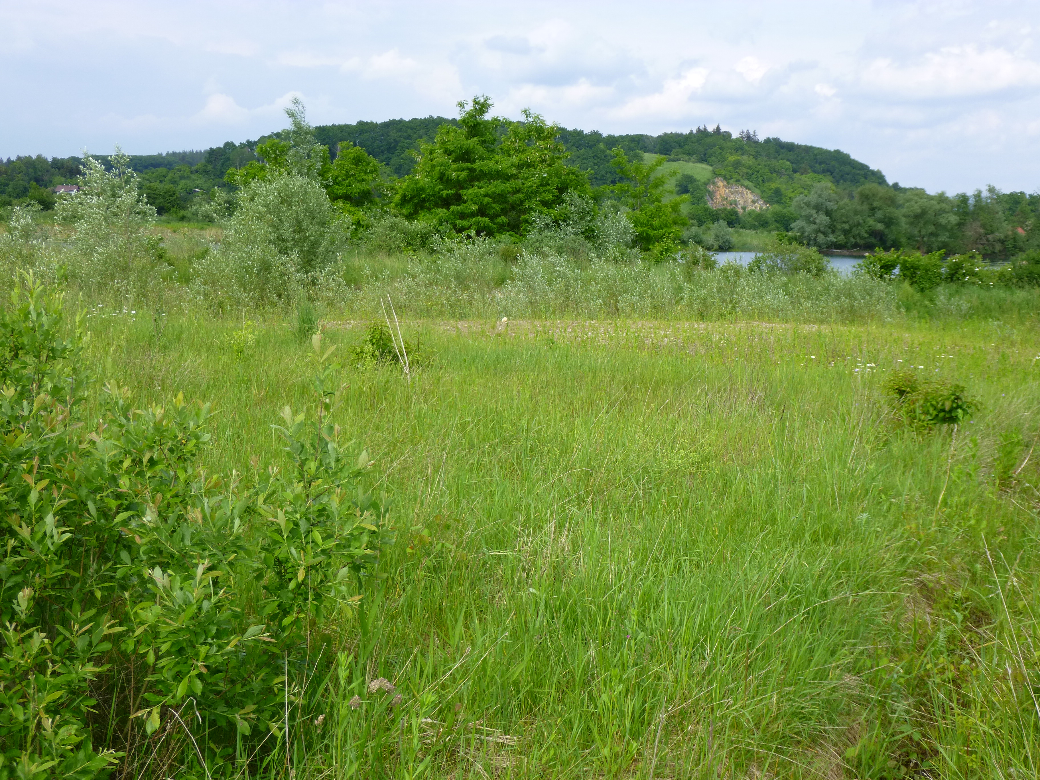 Düne am Lieblweiher unweit von Oberharthausen bei Parkstetten. Im Hintergrund der Helmberg mit Steinbruch im Gemeindebereich von Steinach, Landkreis Straubing-Bogen.